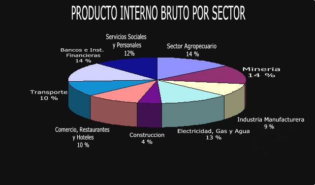 Producto interno bruto por sectores.